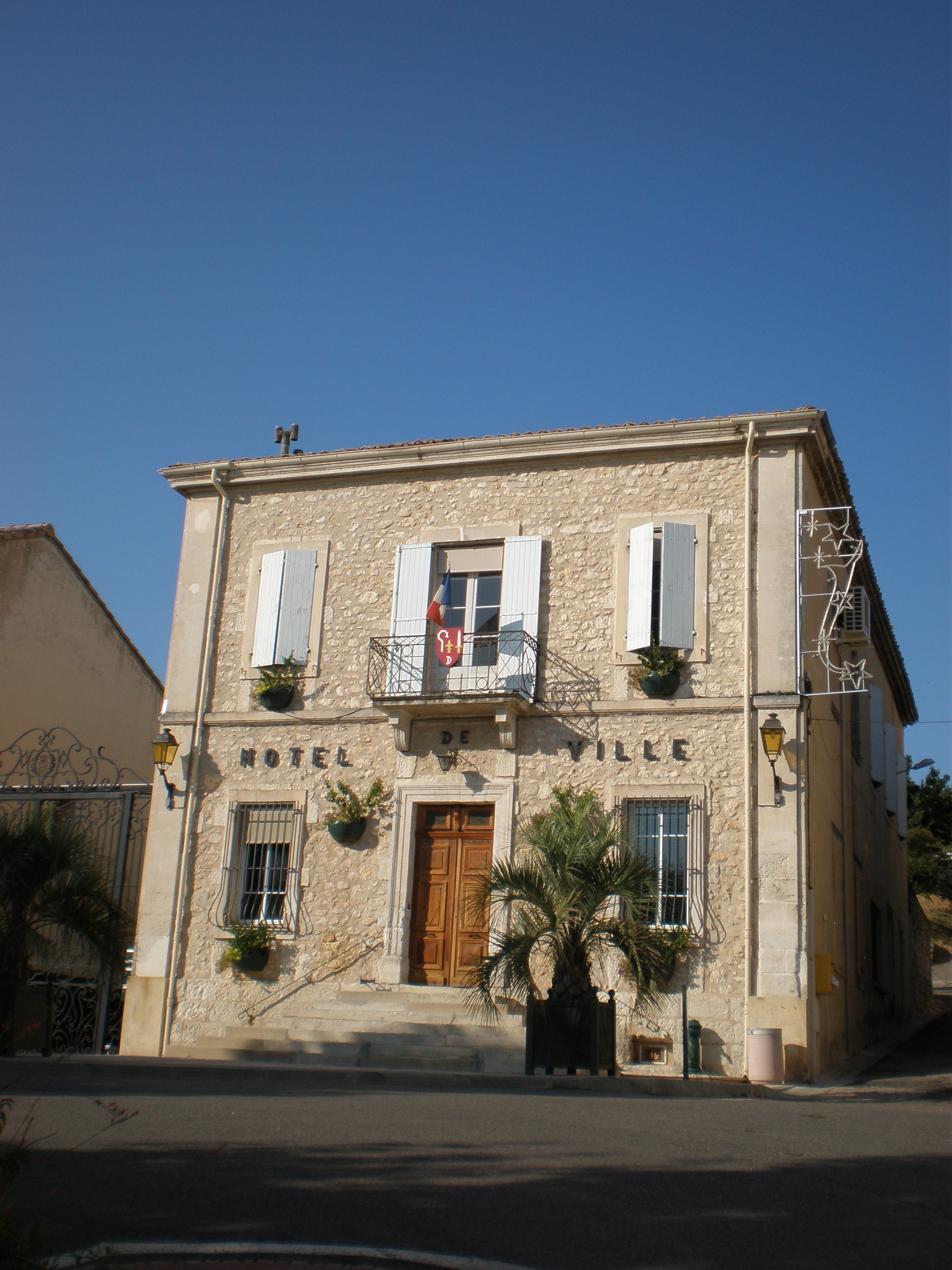 La mairie de Donzère (Drôme)